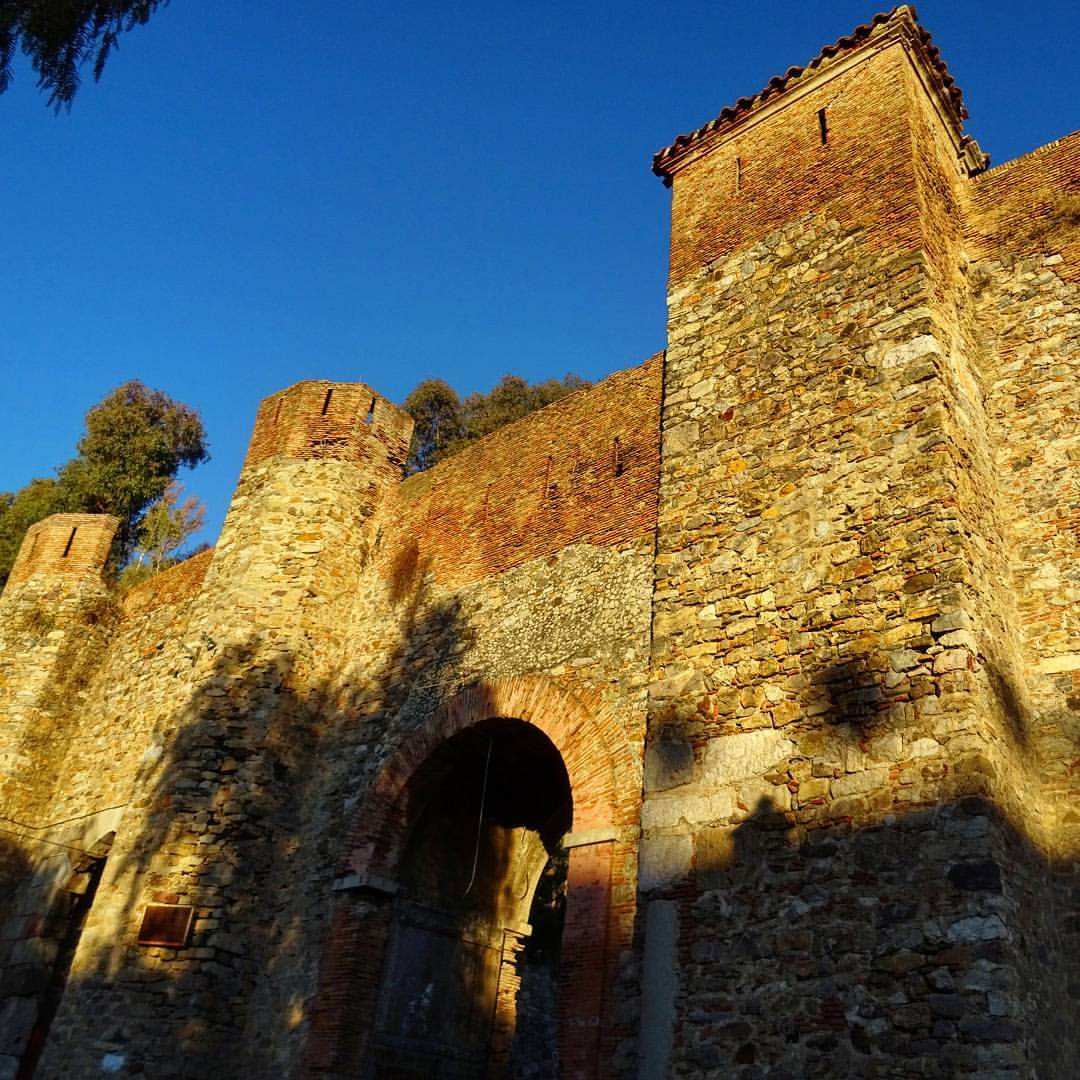 Bab el Bounou à Béjaïa, Porte des Etendards